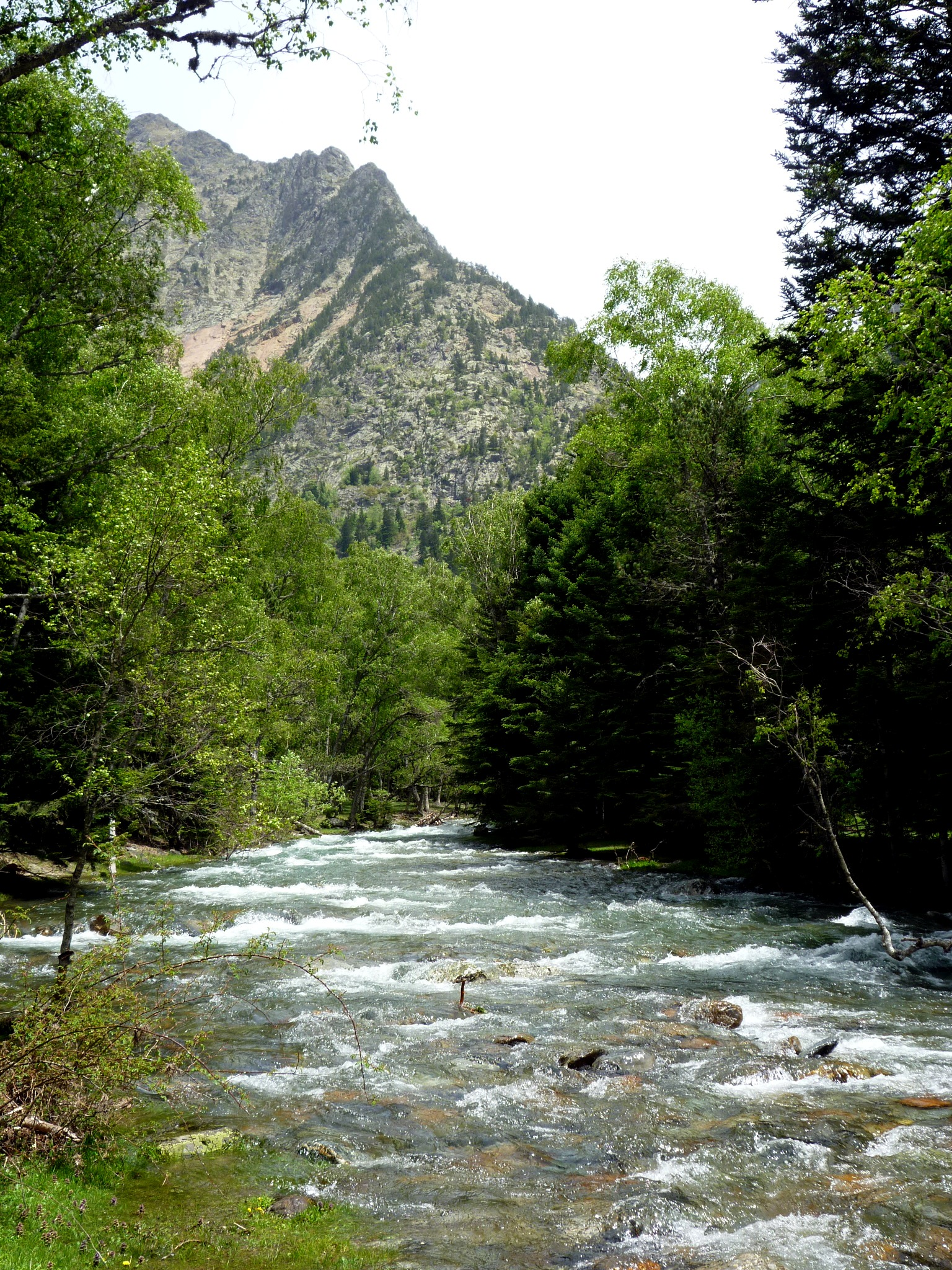 El riu de Lladorre al seu pas pel pla de Boavi, amb els Aspres de Broate al fons. This is a a photo of a natural area in Catalonia, Spain, with id: ES510084